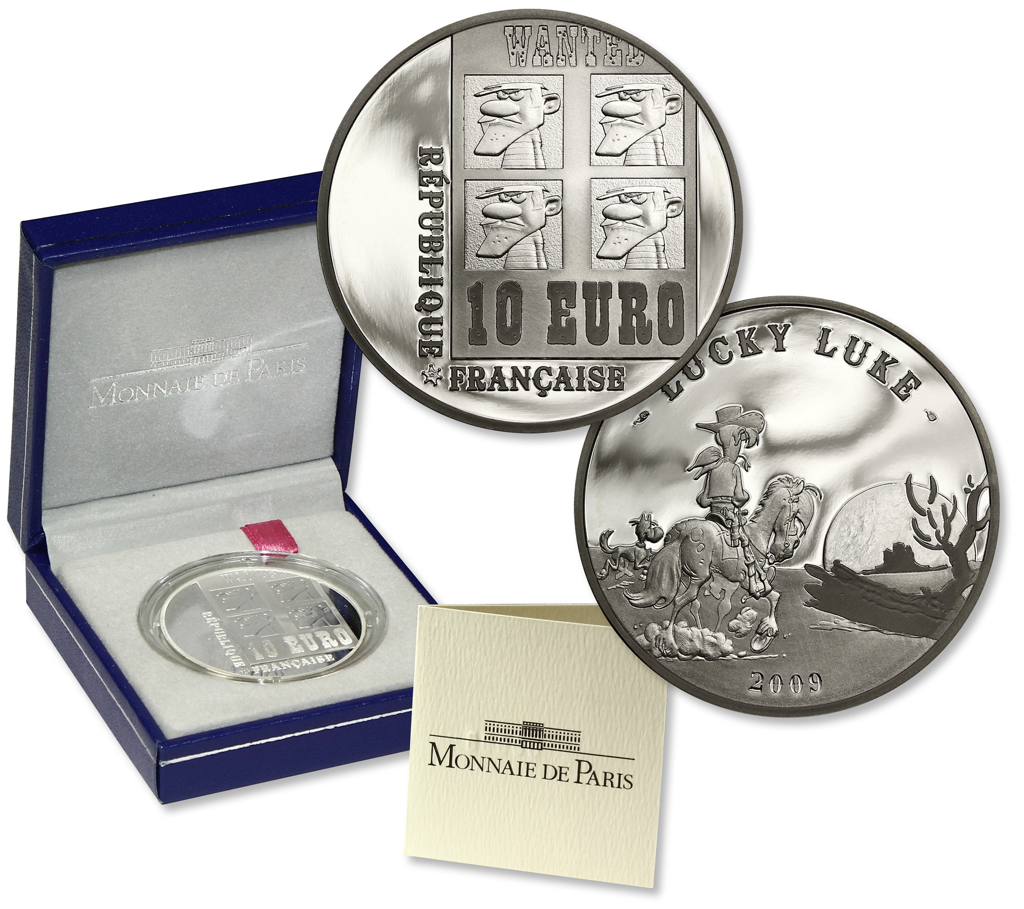 Nom de l'atelier : Pessac Quantité frappée : 5.000 exemplaires Métal : argent Titre en millième : 900‰ Diamètre : 37mm Axe des coins : 12h. Poids : 22,2g. Description avers : Portraits des quatre frères Dalton sous forme d’affichette de western “WANTED” avec valeur faciale 10 EURO. Description revers : Représentation de Lucky Luke en cavalier solitaire s’éloignant dans le soleil couchant avec son cheval Jolly Jumper et son chien Rantanplan .